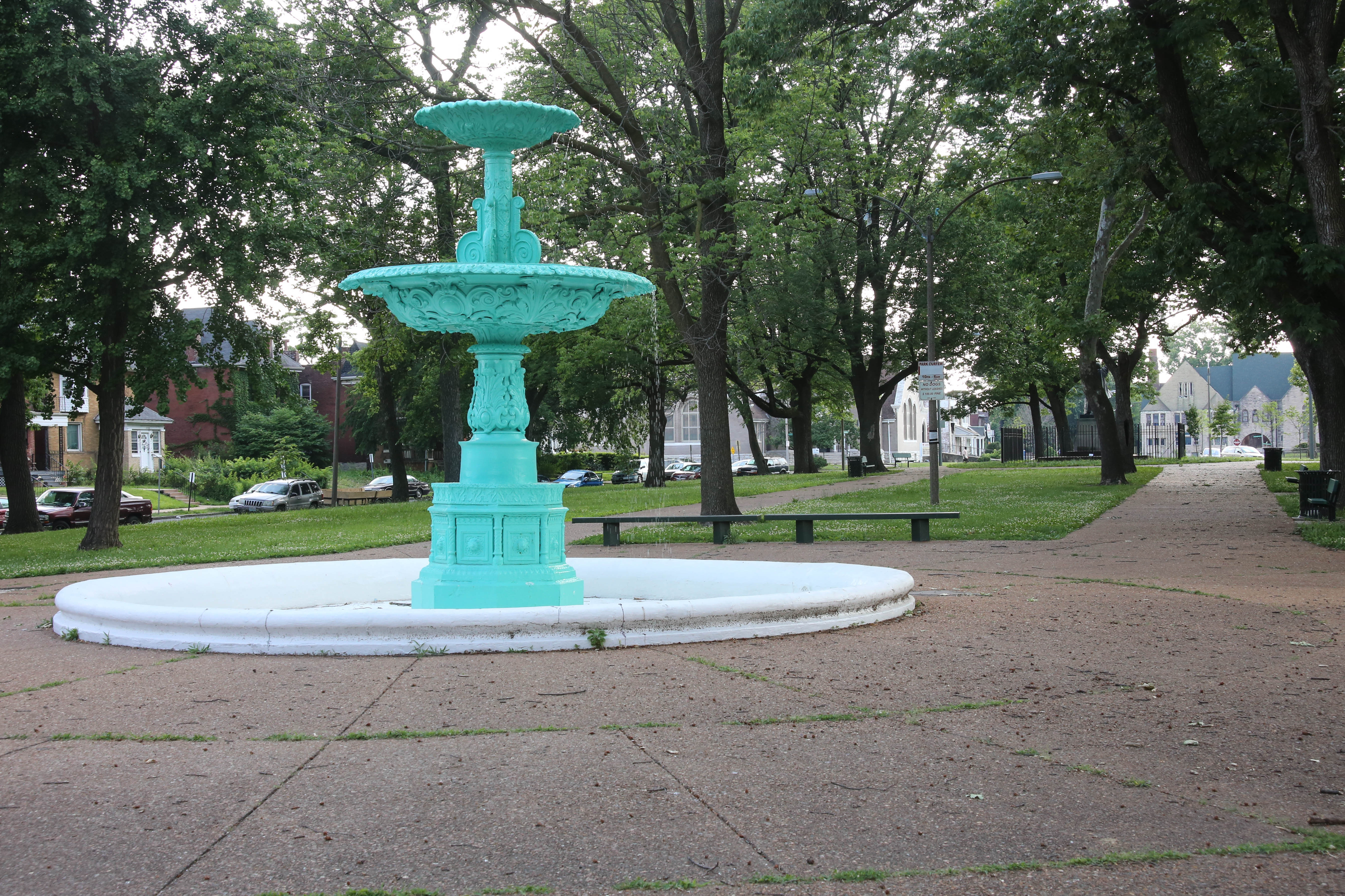 Fountain Park